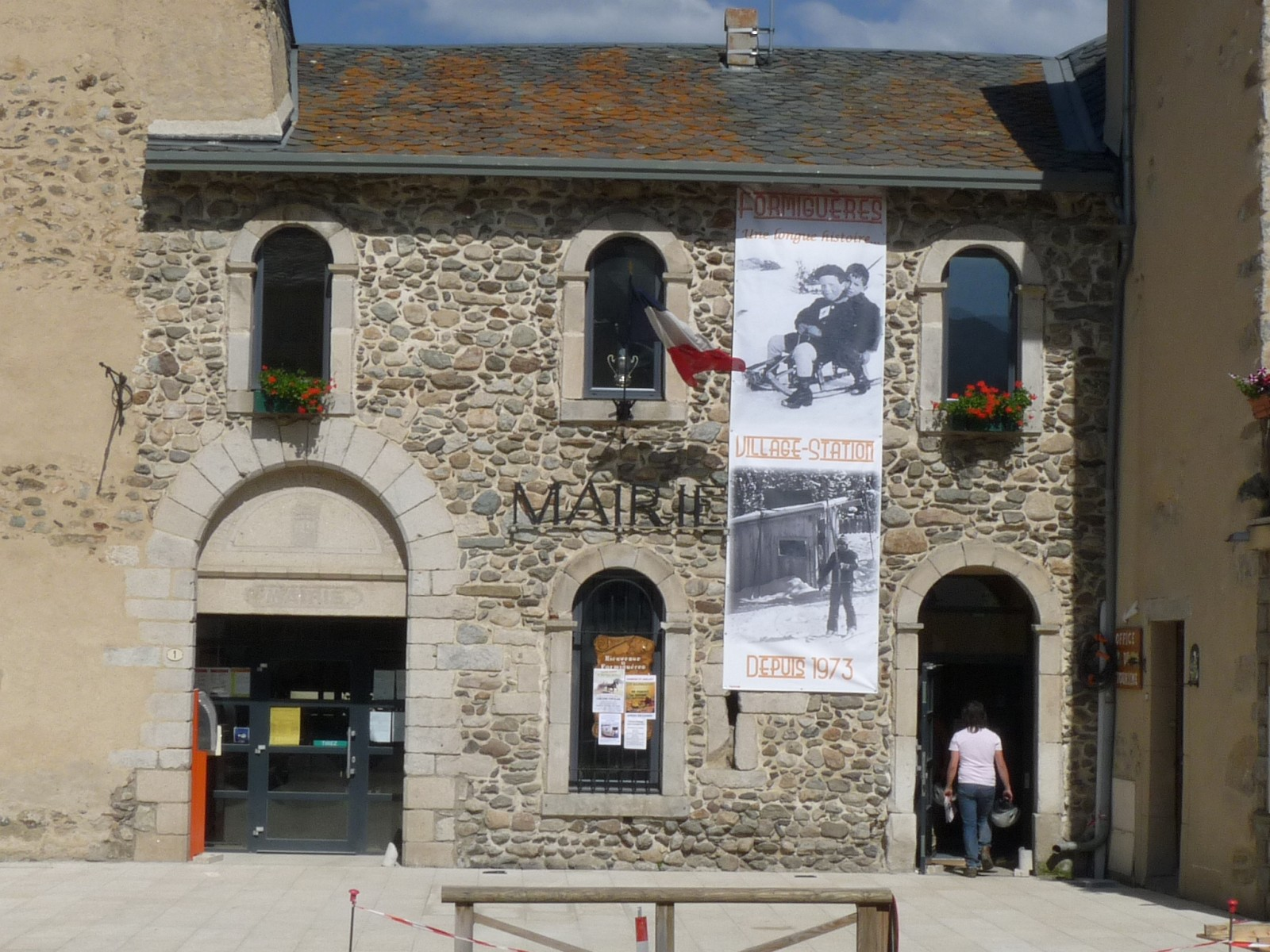 Mairie de Formiguères, Pyrénées-Orientales, France